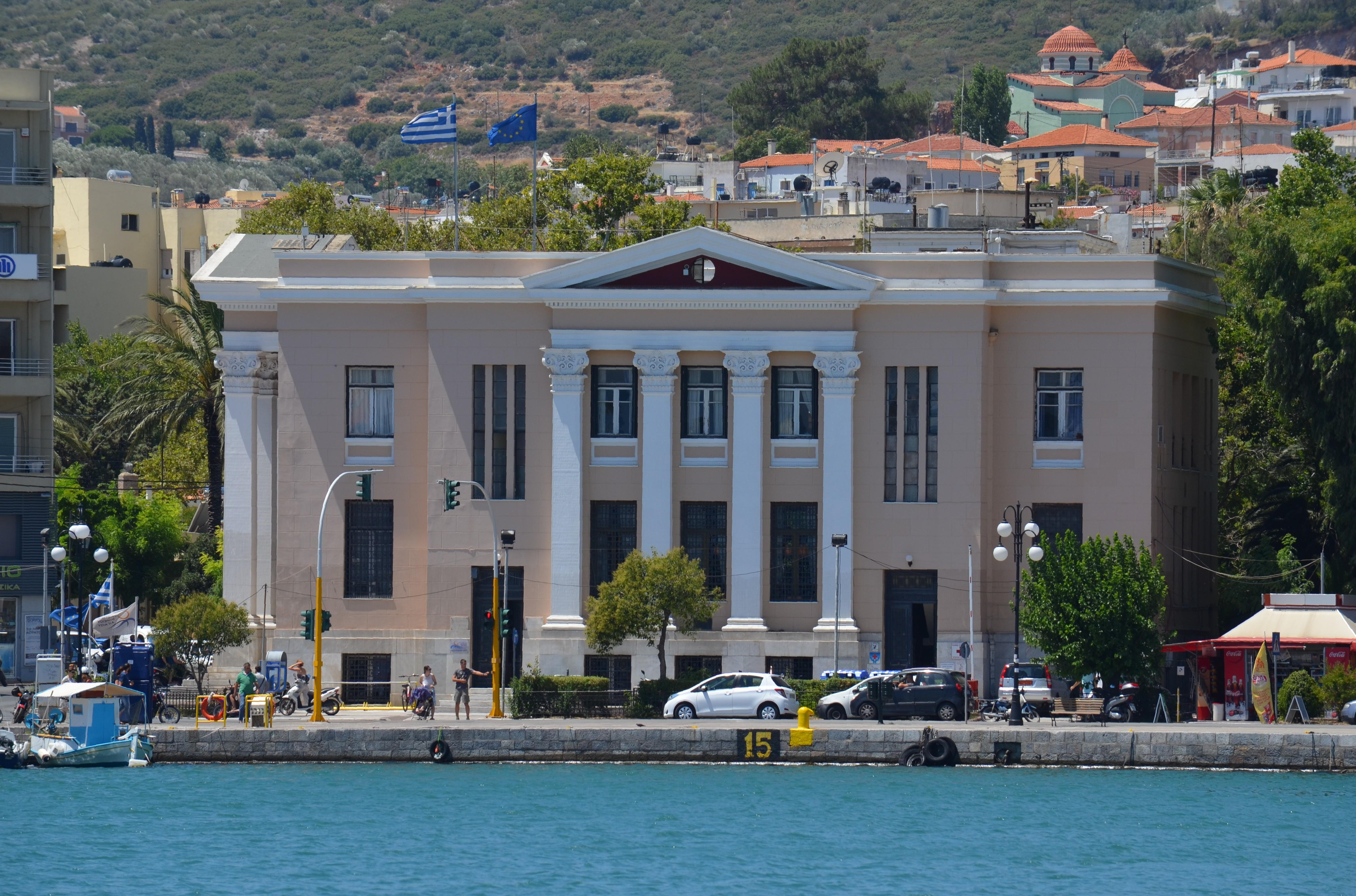 Das Gebäude der Präfektur von Lesbos an der P. Kountourioti an der Promenade.